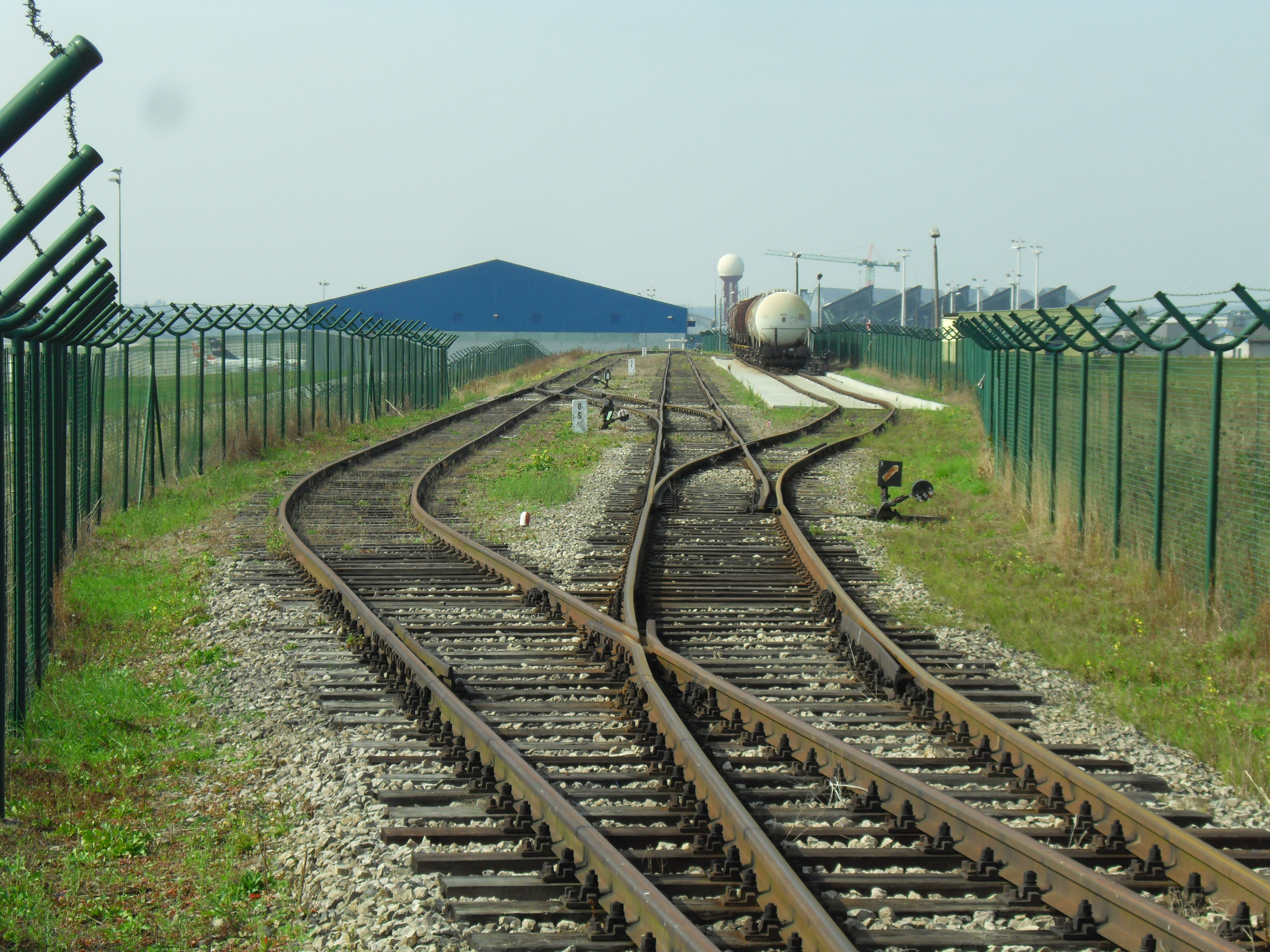 Matarnia. Port lotniczy Gdańsk, przystanek kolejowy, zakończenie linii kolejowej z Osowy.